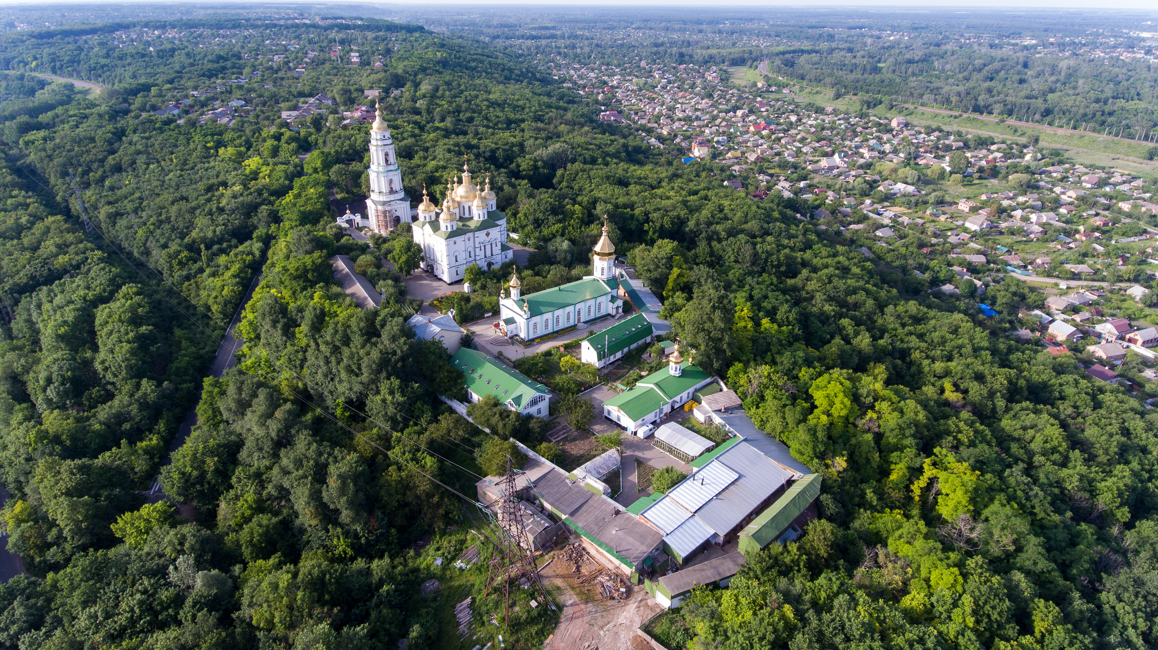 Свято-Хрестовоздвиженський жіночий монастир, Полтава, Вул. Свердлова, 3 (2-а?)